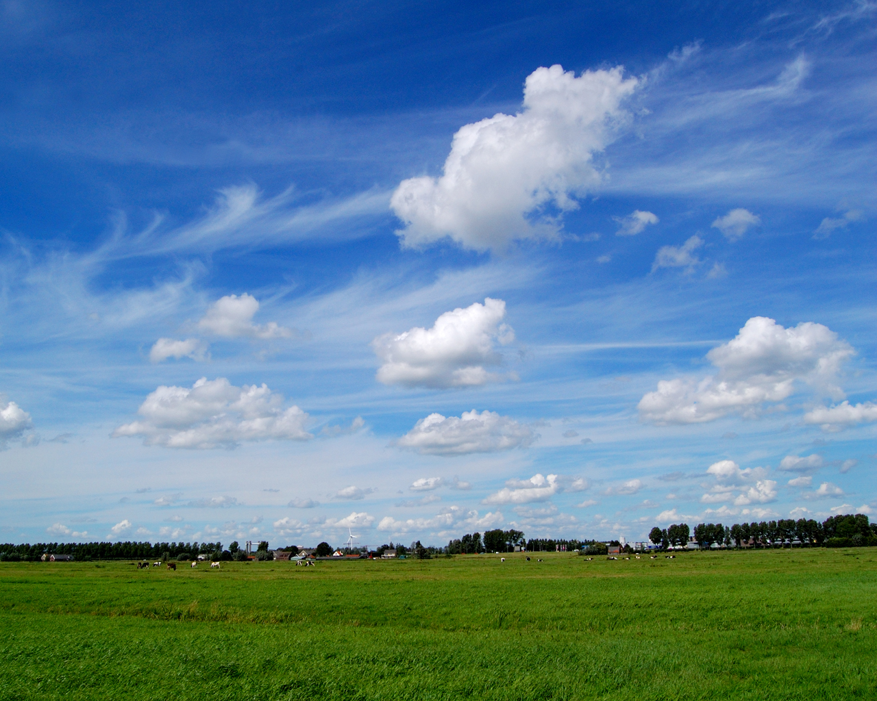 Foto van de Zuidplaspolder in Moordrecht, Groene Hart - Zuid Holland